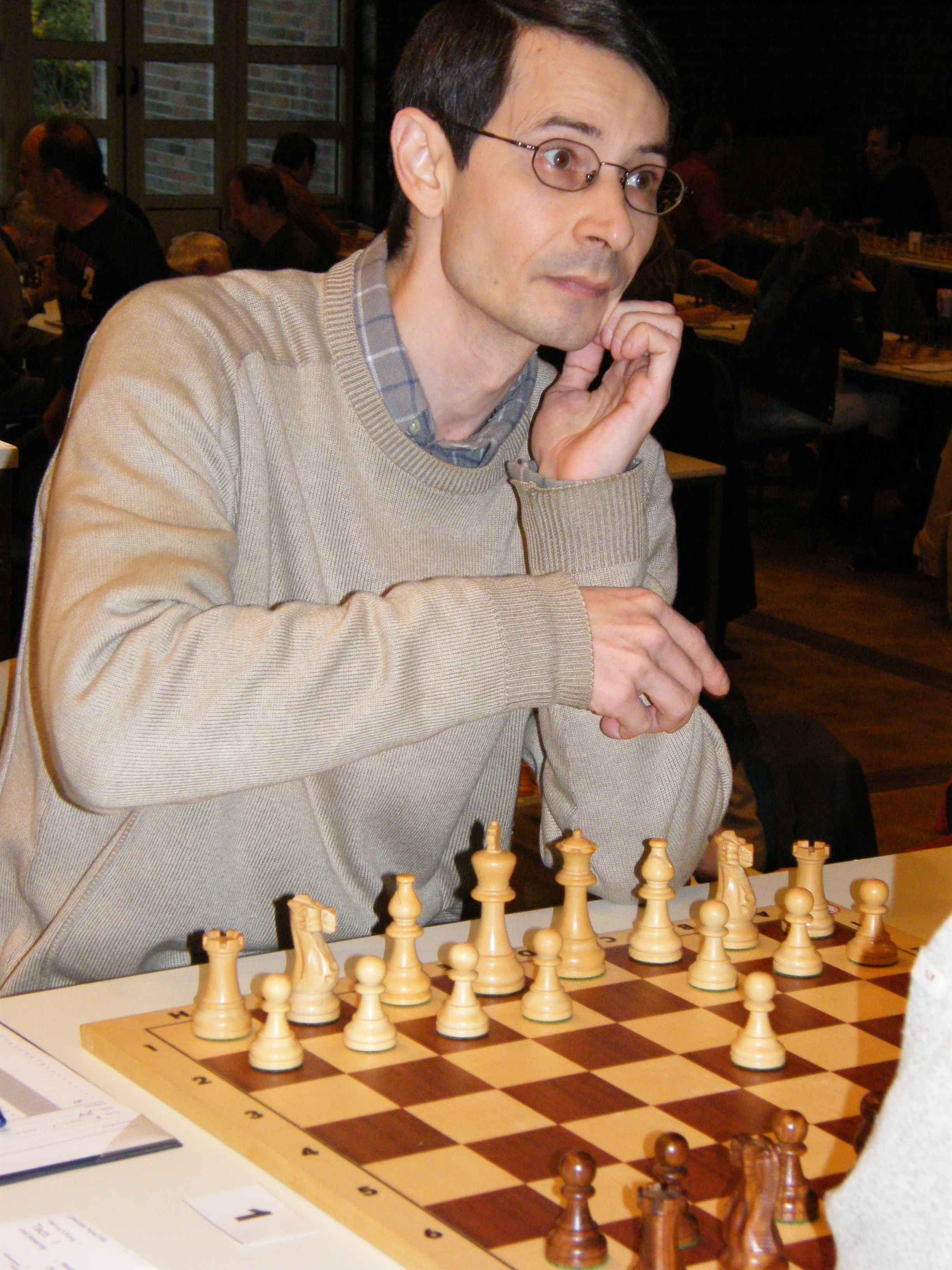 Alexander Graf in der 7. Runde des Schachturniers Lichtenrader Herbst in Berlin